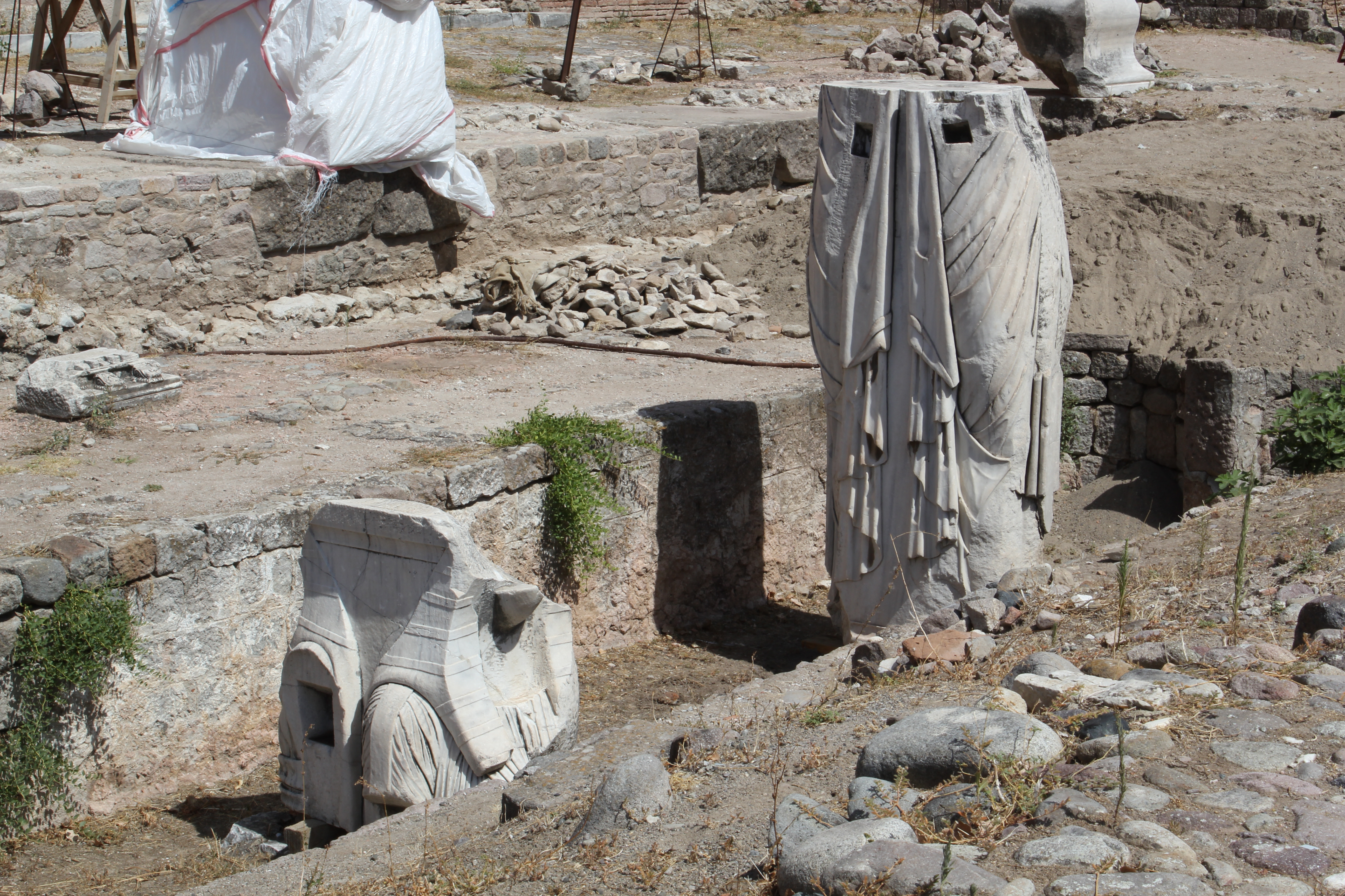 Rote Halle, Pergamon, Westtürkei, Atlanten im Südhof